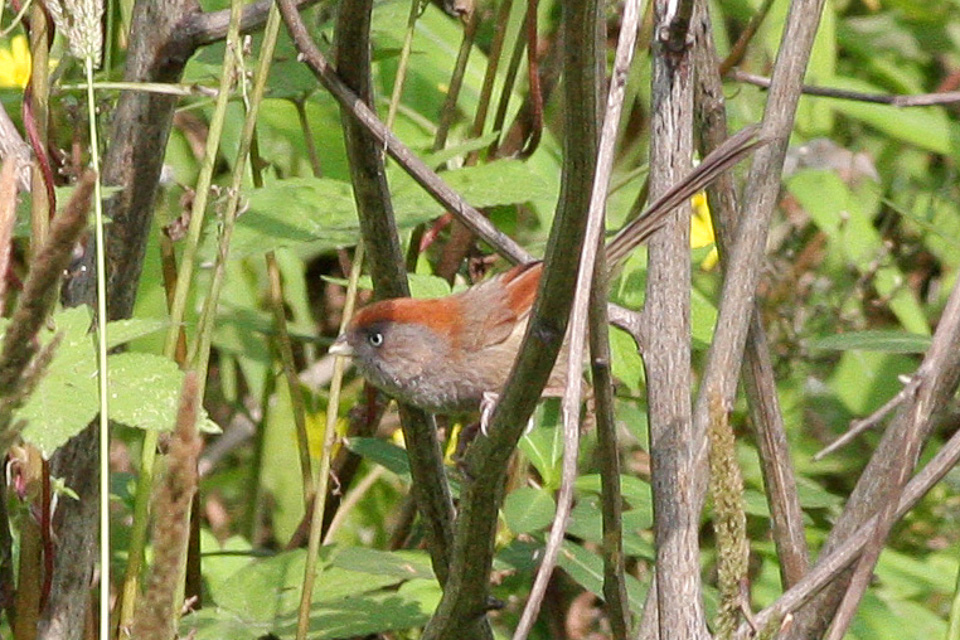 Du Fu's Cottage Garden, Chengdu